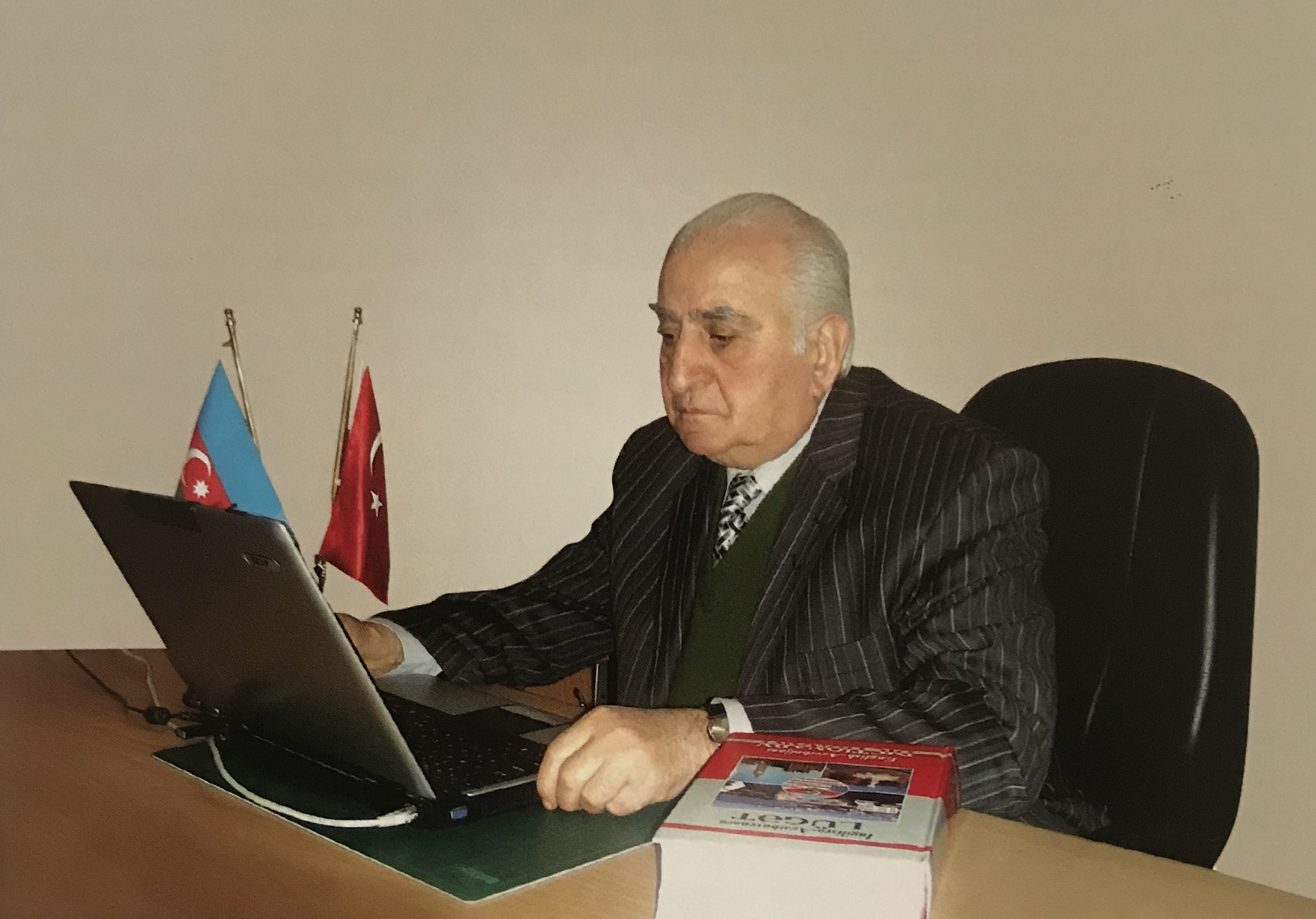 Səhifənin şablon hissəsində təqdim olunmaq üçün əlavə edilir.